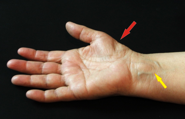 Դաստակային թունելի համախտանիշ. ուշ շրջան: Կարմիր սլաքով նշված է թենարի ապաճումը (ատրոֆիան), իսկ դեղնով՝ դաստակի լիպոման